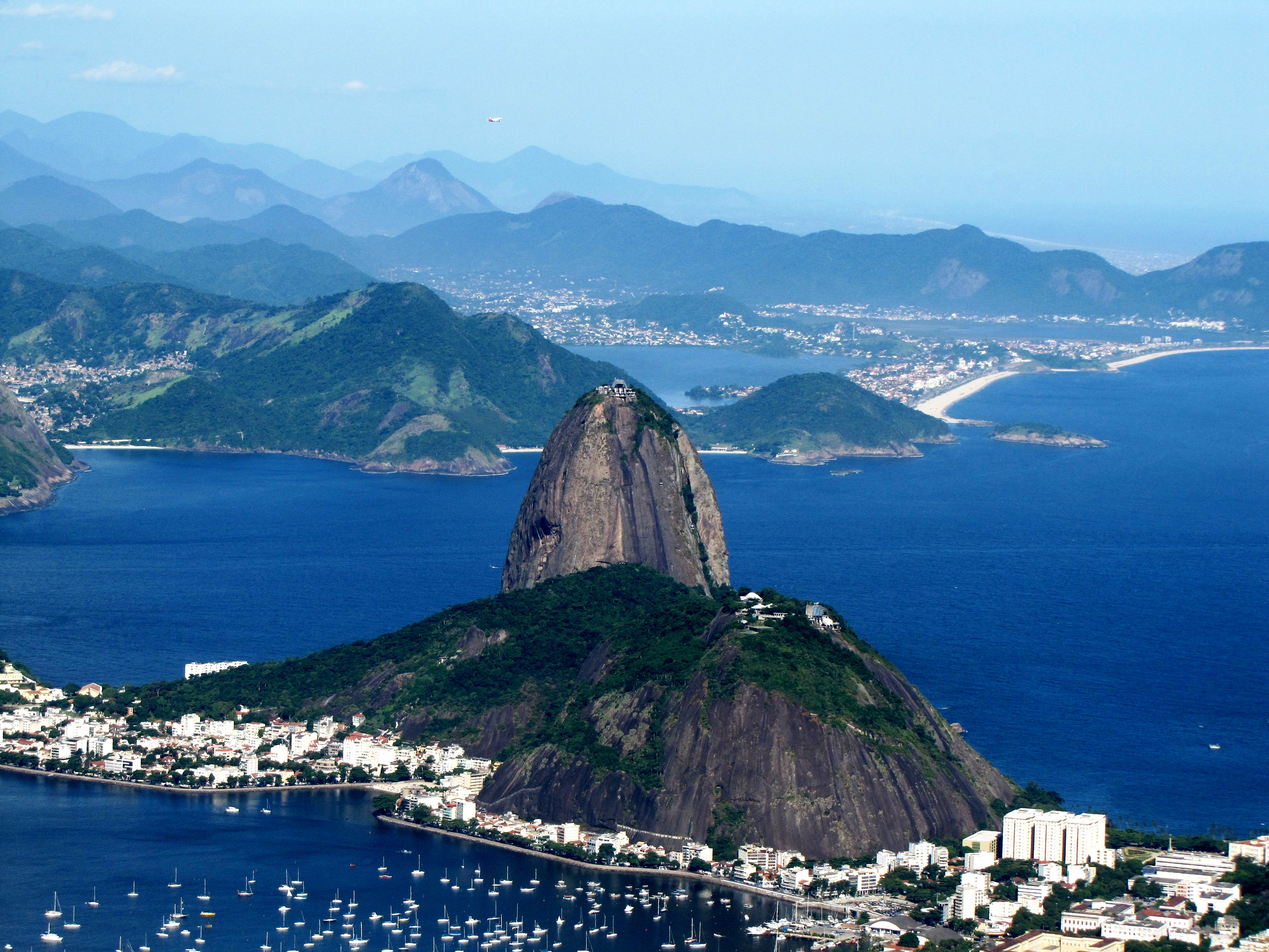 Pão de Açucar visão do Corcovado - RJ